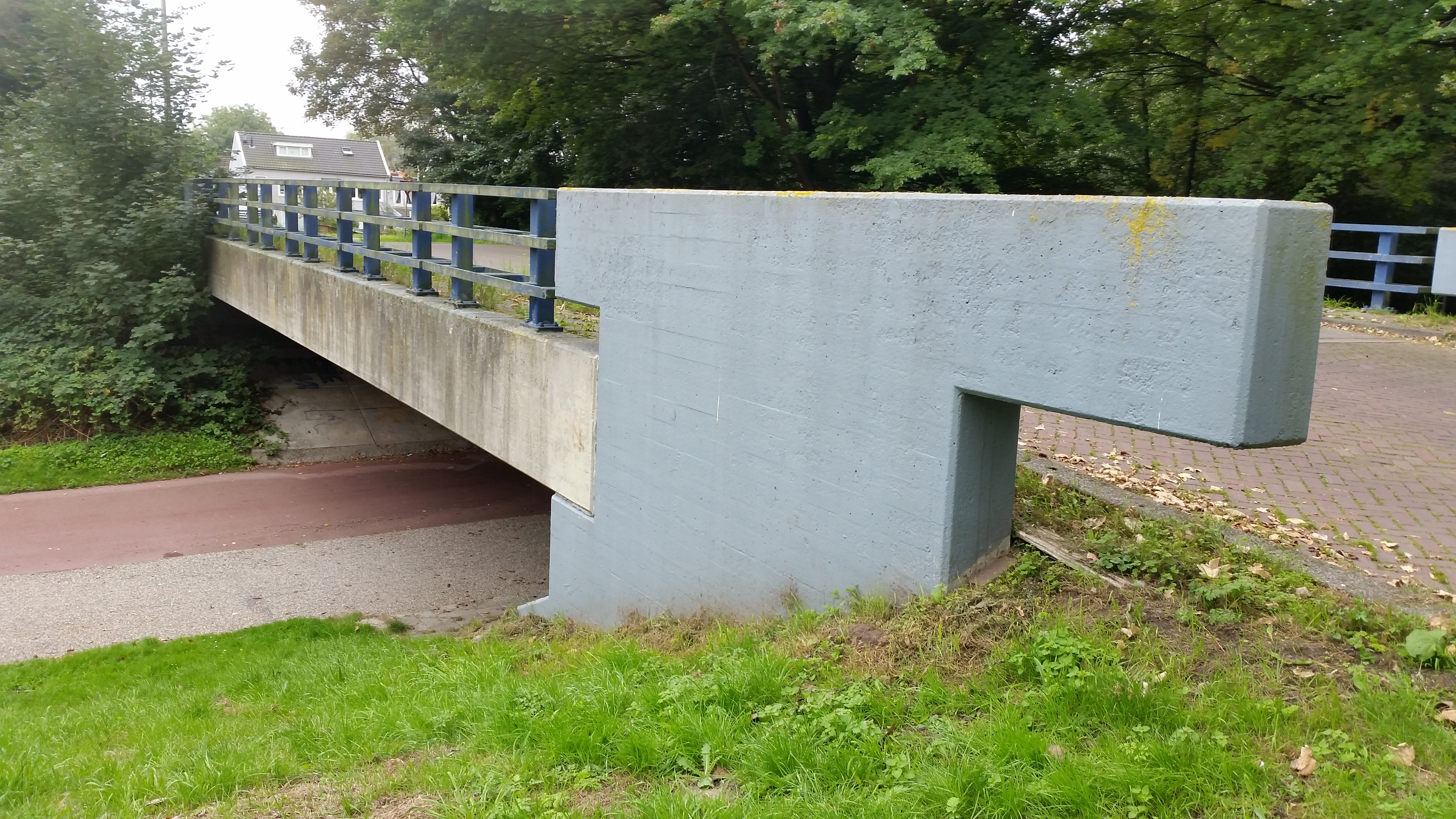 Brug 893 (in Amsterdam), de T-vormige borstwering en blauwe leuningen